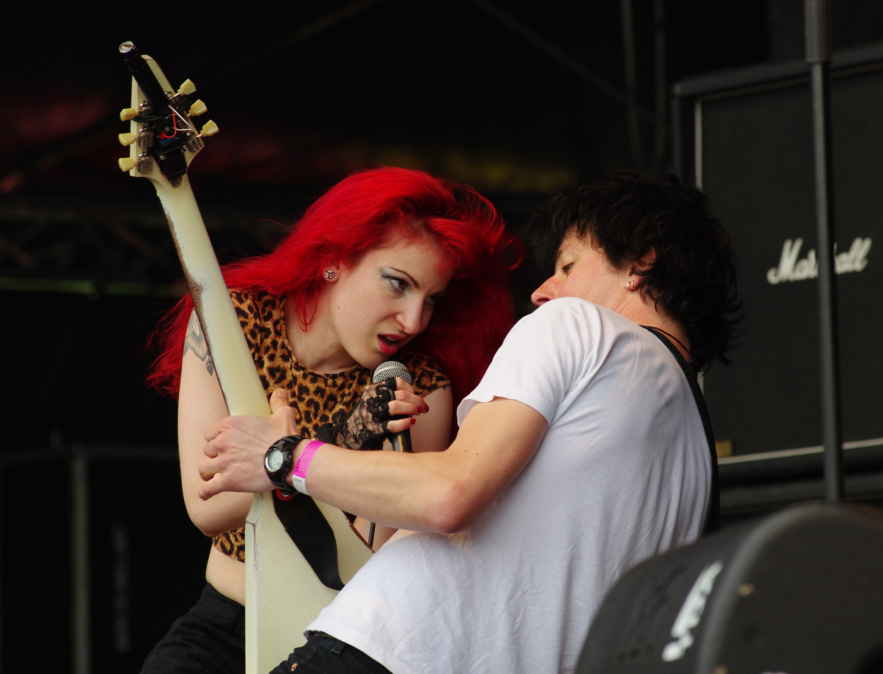 Bonsai Kitten, Punkrockband aus Berlin, Auftritt beim Ruhrpott Rodeo 2013 in Hünxe. Tiger Lilly Marleen (Gesang), Highko Strom (Gitarre).